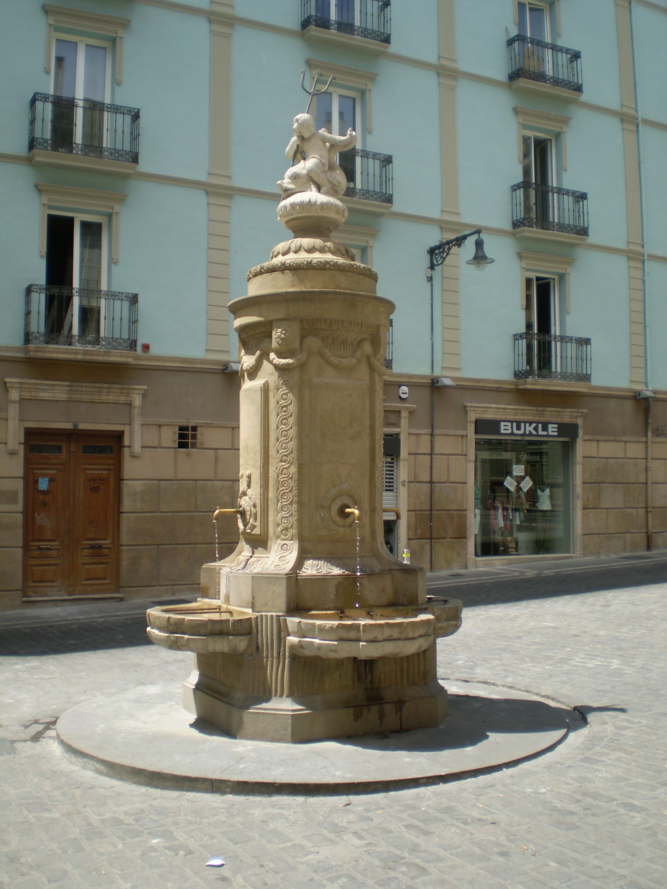 Fuente de Neptuno de la Plaza del Consejo de Pamplona diseñada por Luis Paret en el siglo XVIII